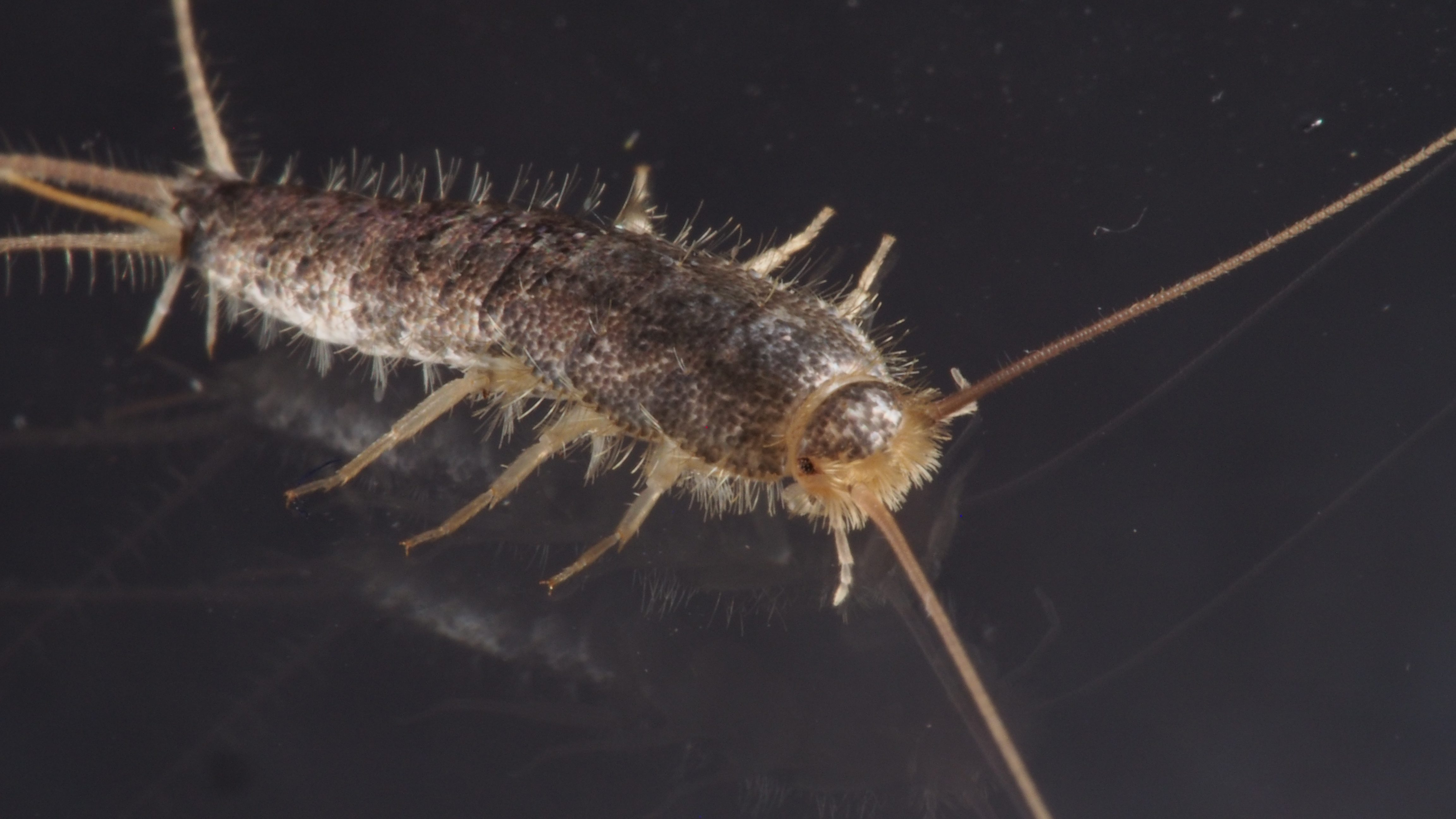 Foto Mycoteam: Voksent individ av skjeggkre. Den karakteristiske behåringen, særlig på hodet er godt synlig.